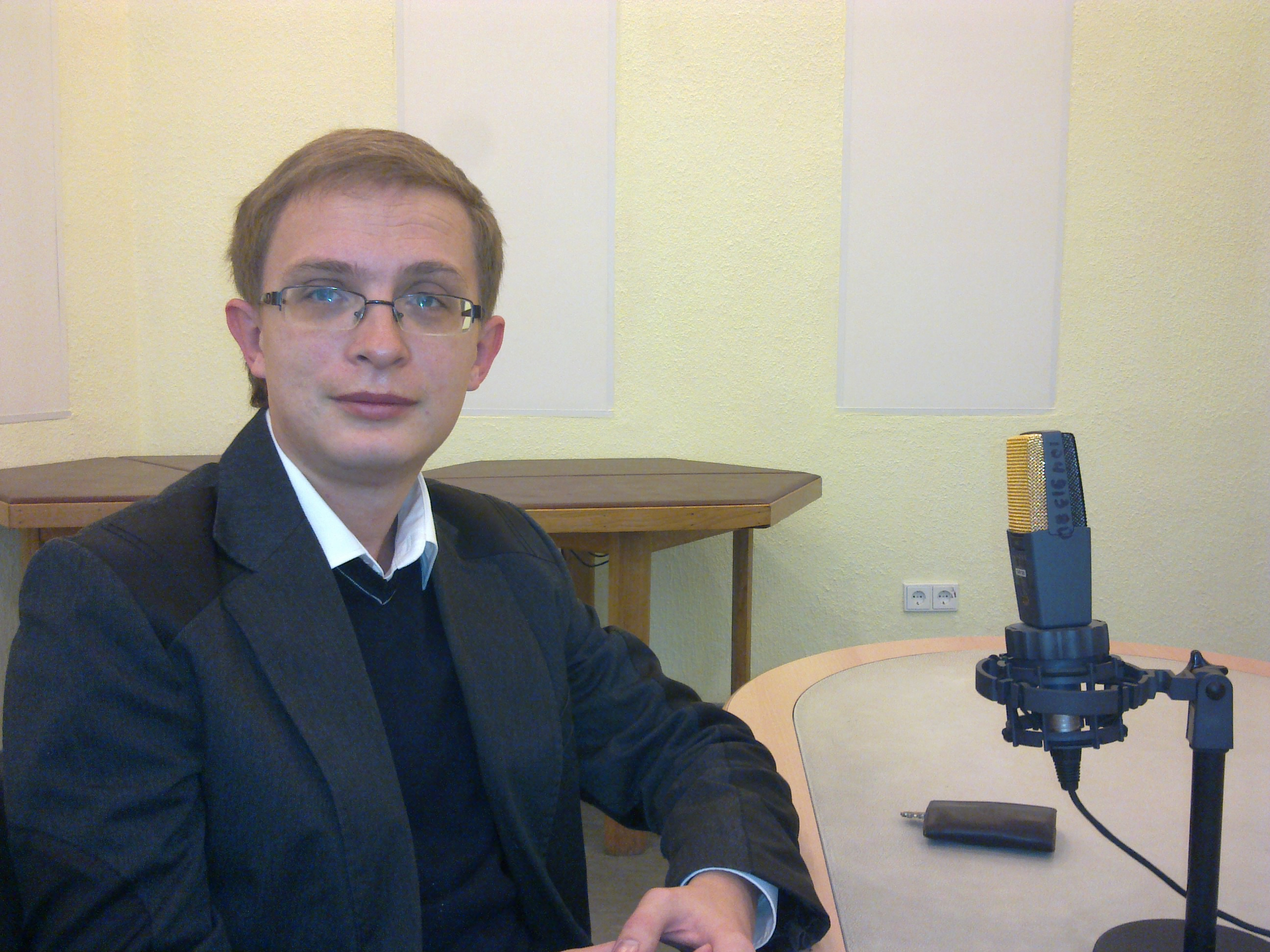 Іван Рябчій у студії Українського радіо